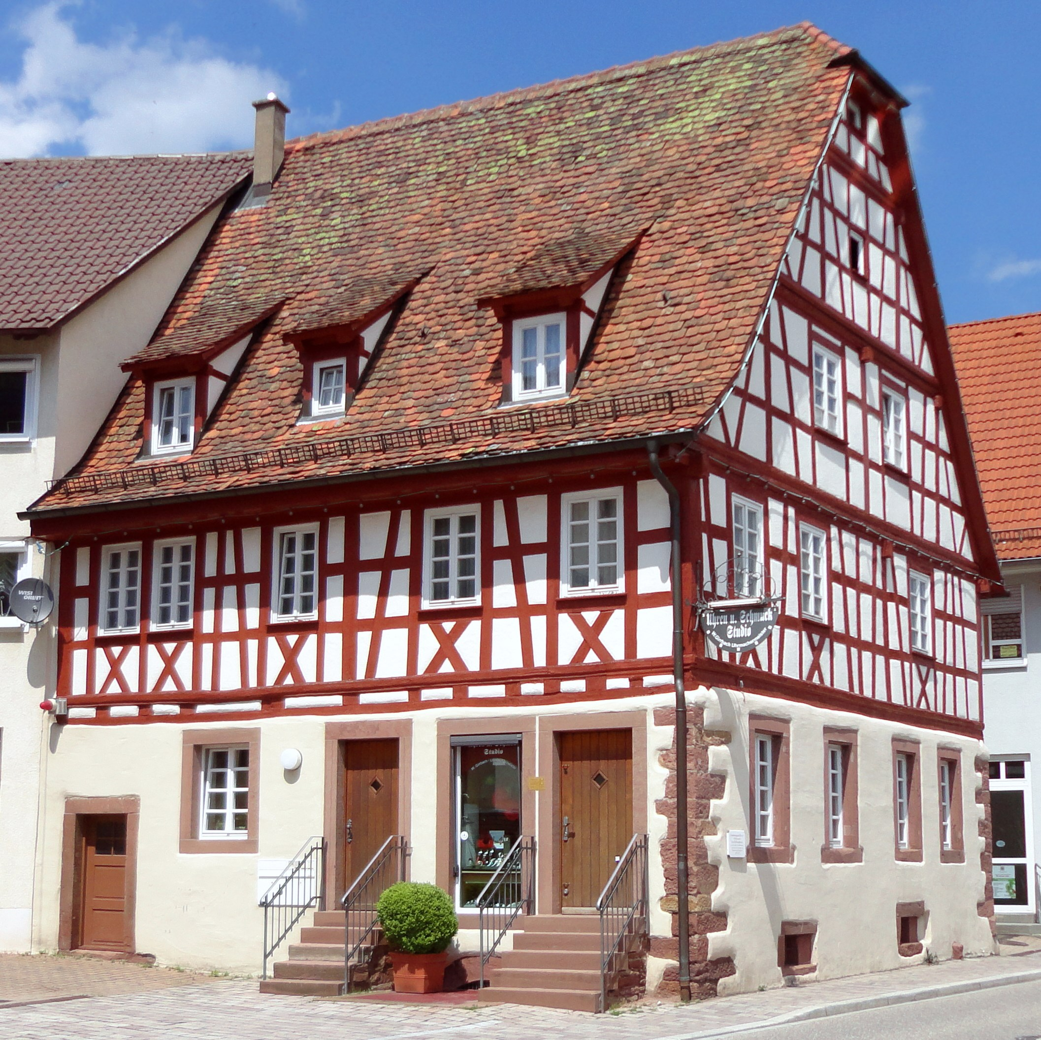 Denkmalgeschütztes Wohn- und Geschäftsgebäude aus dem 18. Jahrhundert, Hauptstraße in Birkenfeld (Württemberg).